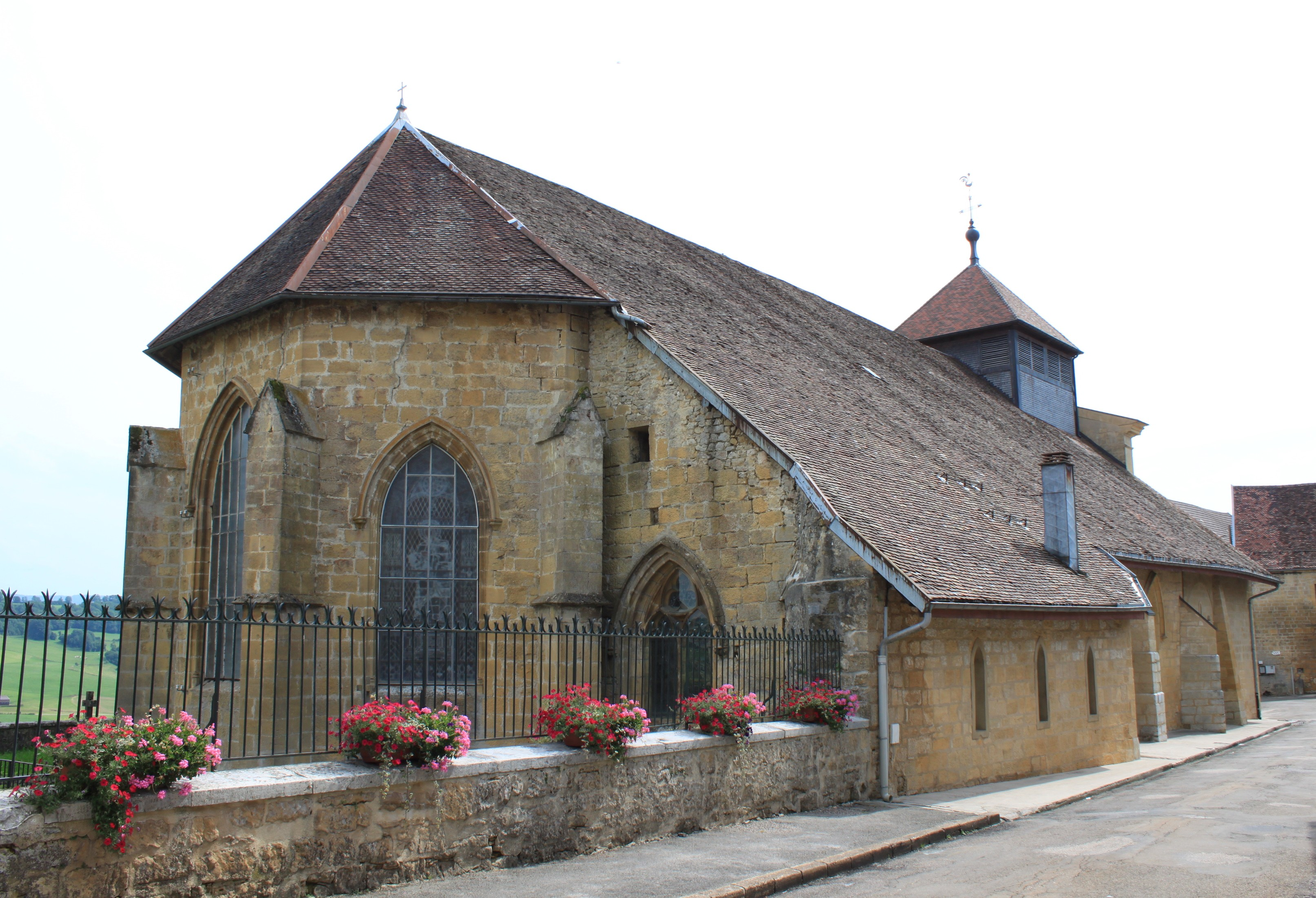 Nozeroy, Jura, Franche-Comté, France